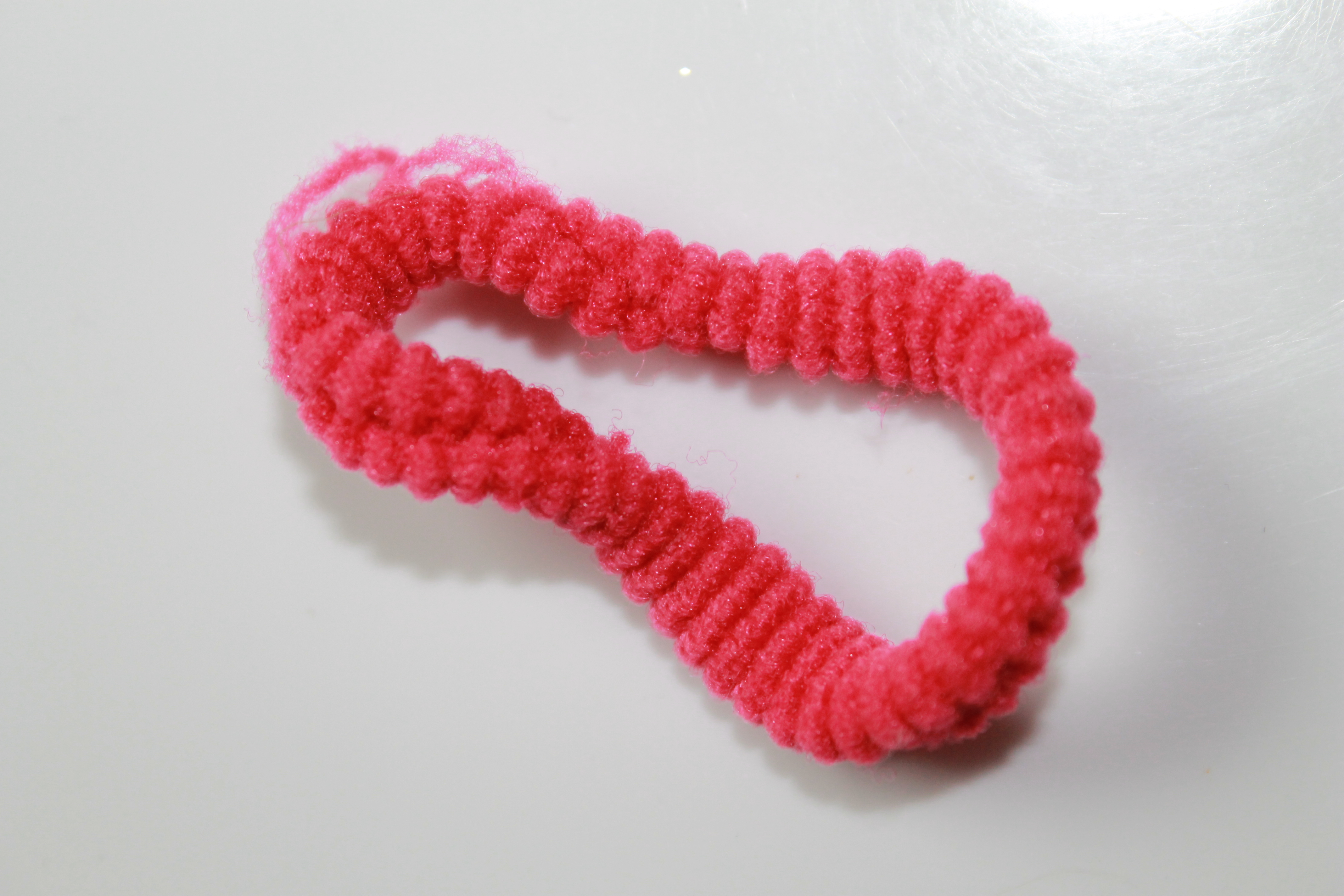 Ein Haarband